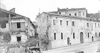 Il carcere degli Scalzi a Verona, poco dopo la fine della seconda guerra mondiale